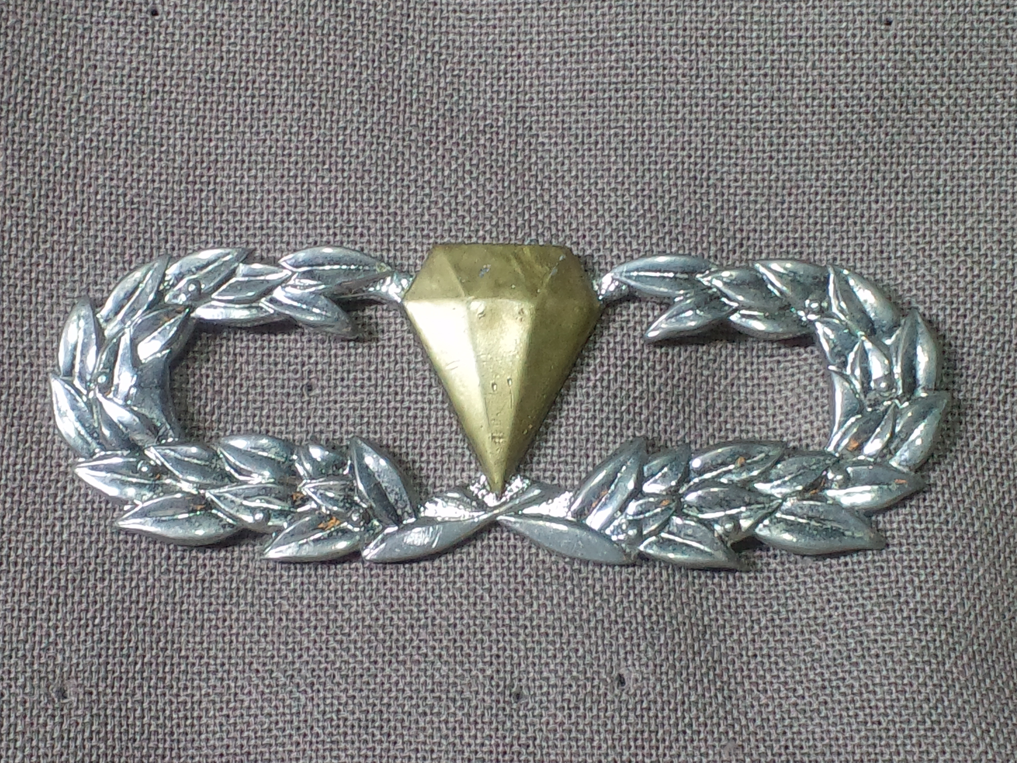 旧レンジャーき章(甲)